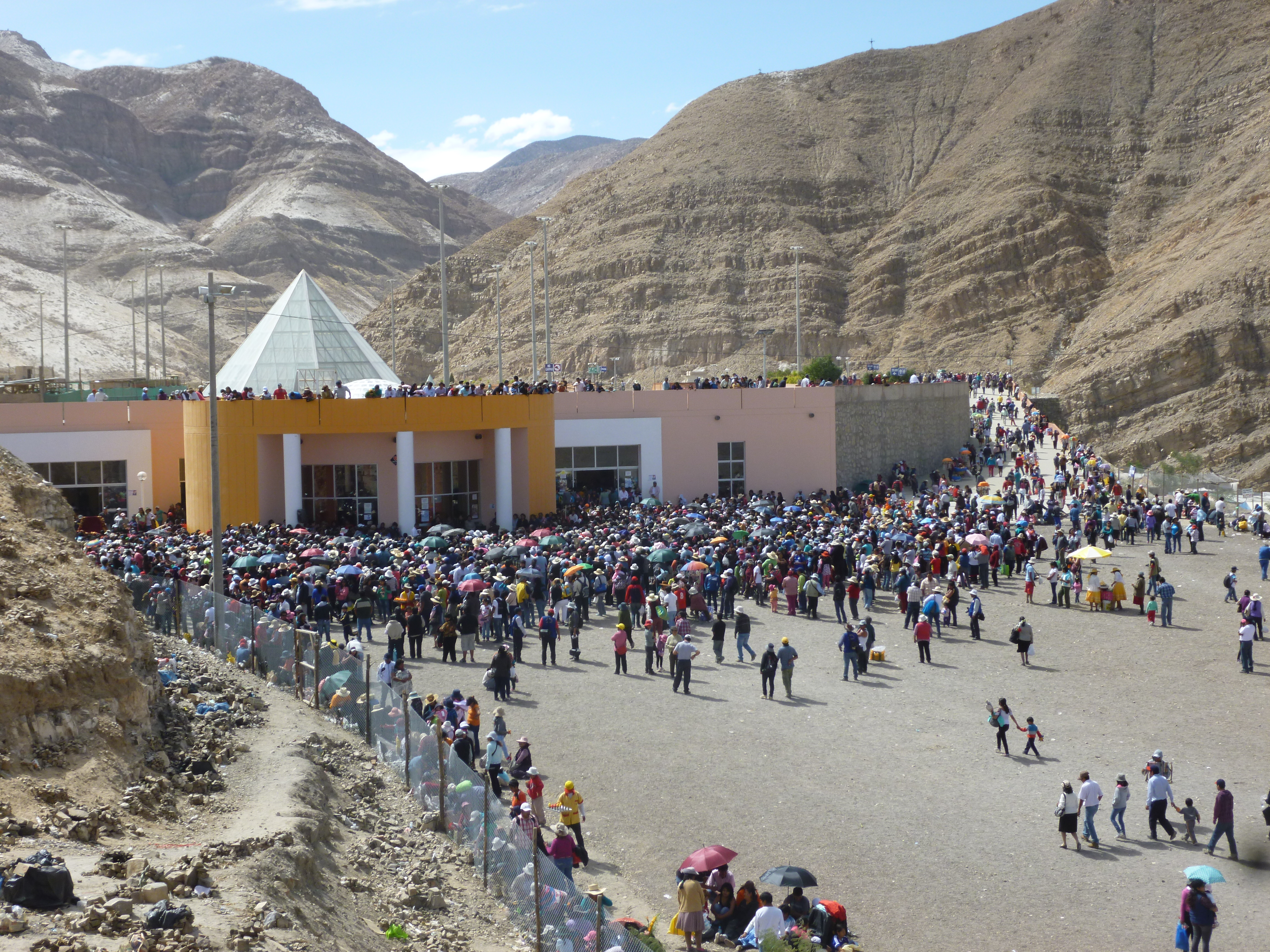 Vista Exterior del nuevo santuario que alberga a la Virgen de Chapi, ubicado en el Distrito de Polobaya, Arequipa